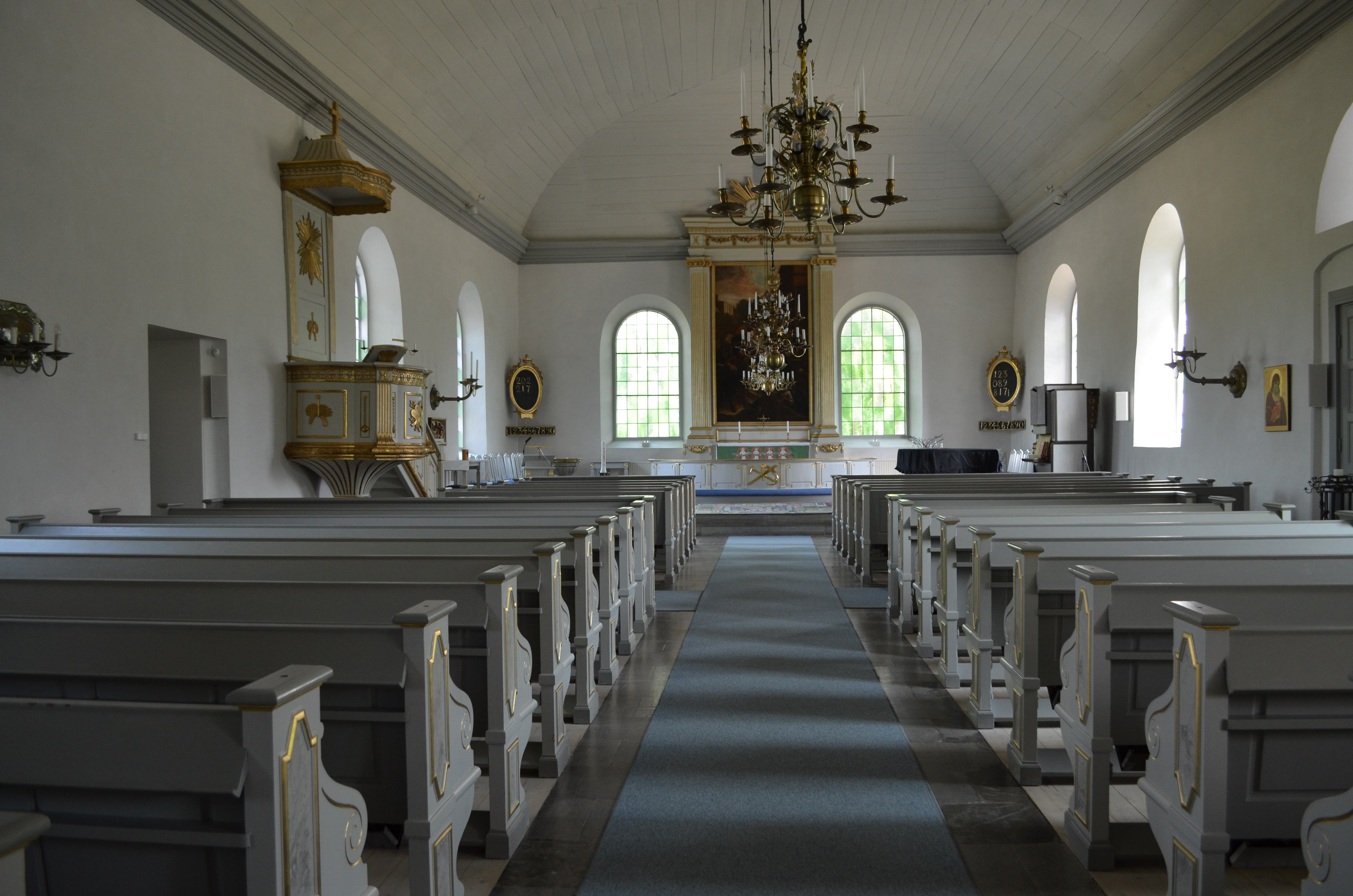 Kyrkorummet